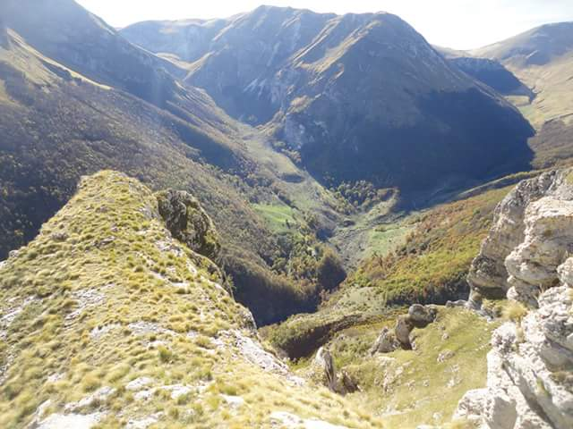 Capotenna e Valle Orteccia, visti dai contrafforti del Monte Priora, Monti Sibillini